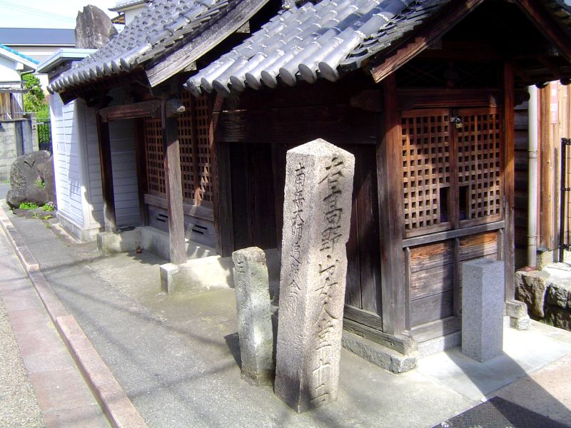 関茶屋付近西高野街道の里道標石と祠（堺市東区）。